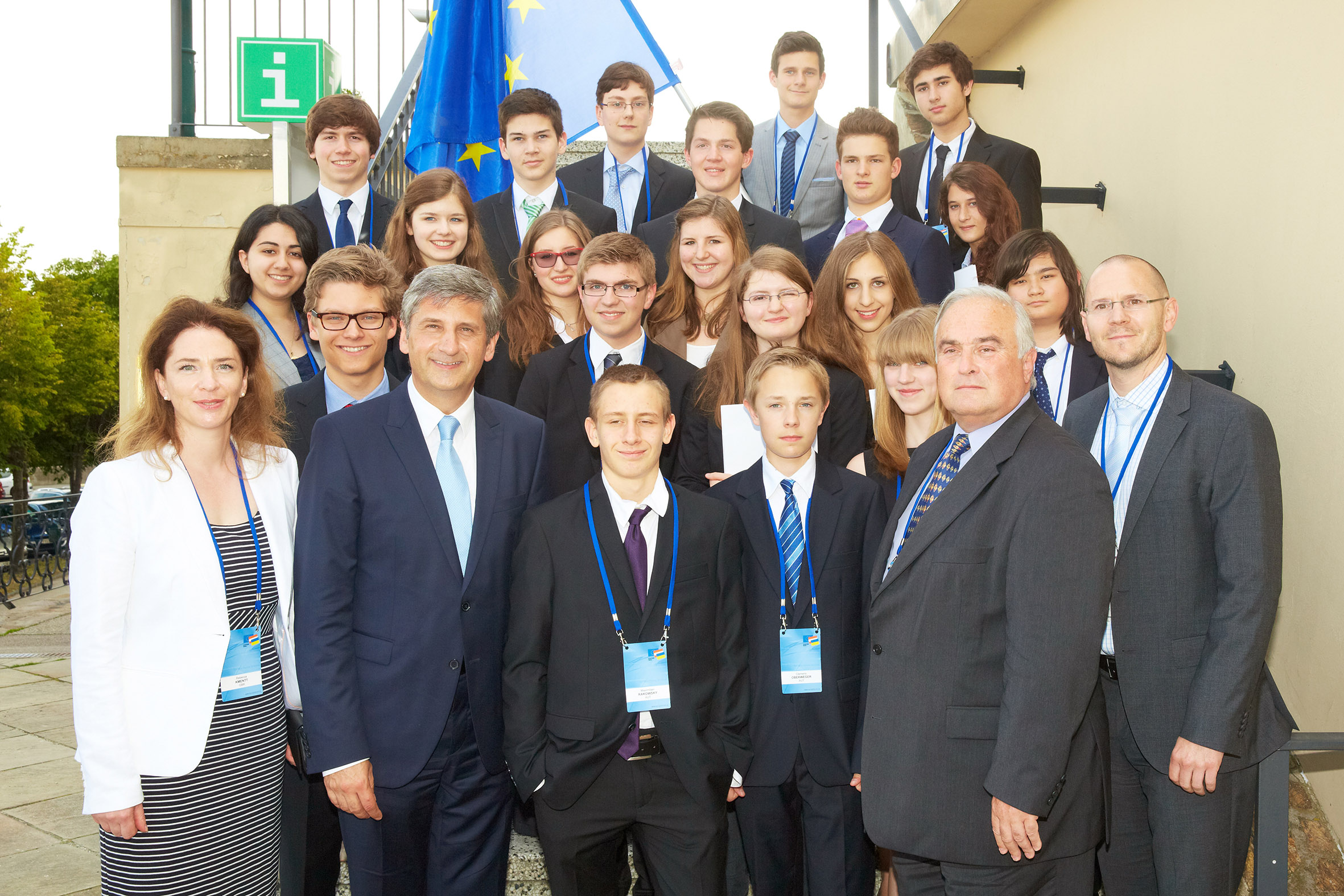 © - Wien 16.06.2013 - Aussenminister Spindelegger nahm am 18. Europa-Forums Wachau, im Stift Göttweig teil das heuer 'Jenseits der Krise - Umrisse eines neuen Europas' zum Thema hatte PHOTO: Aussenminister Michael Spindelegger zusammen mit einer Schulklasse.